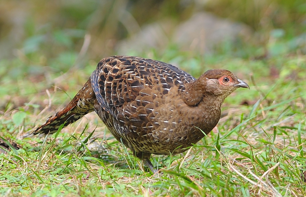 Female Mikado Pheasant (Syrmaticus mikado)